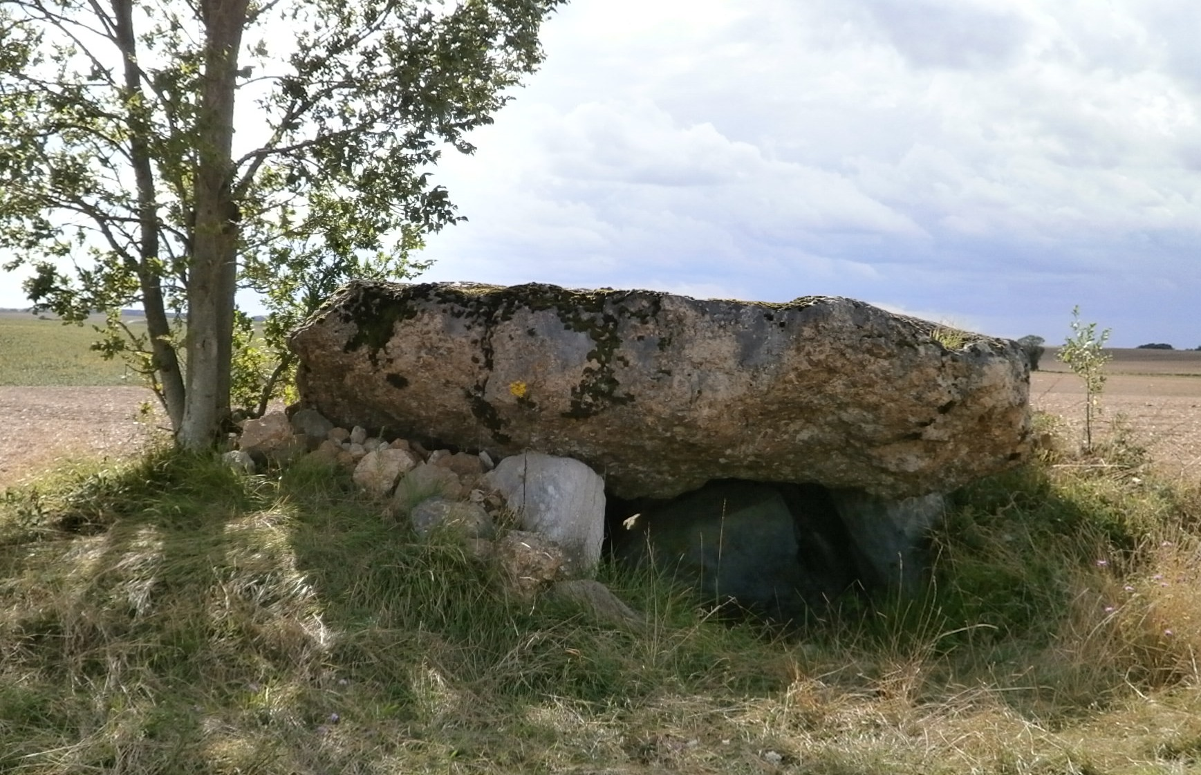 Dolmen dit d"Hys" (hameau de Genillé) bien que situé sur la commune voisine du Liège